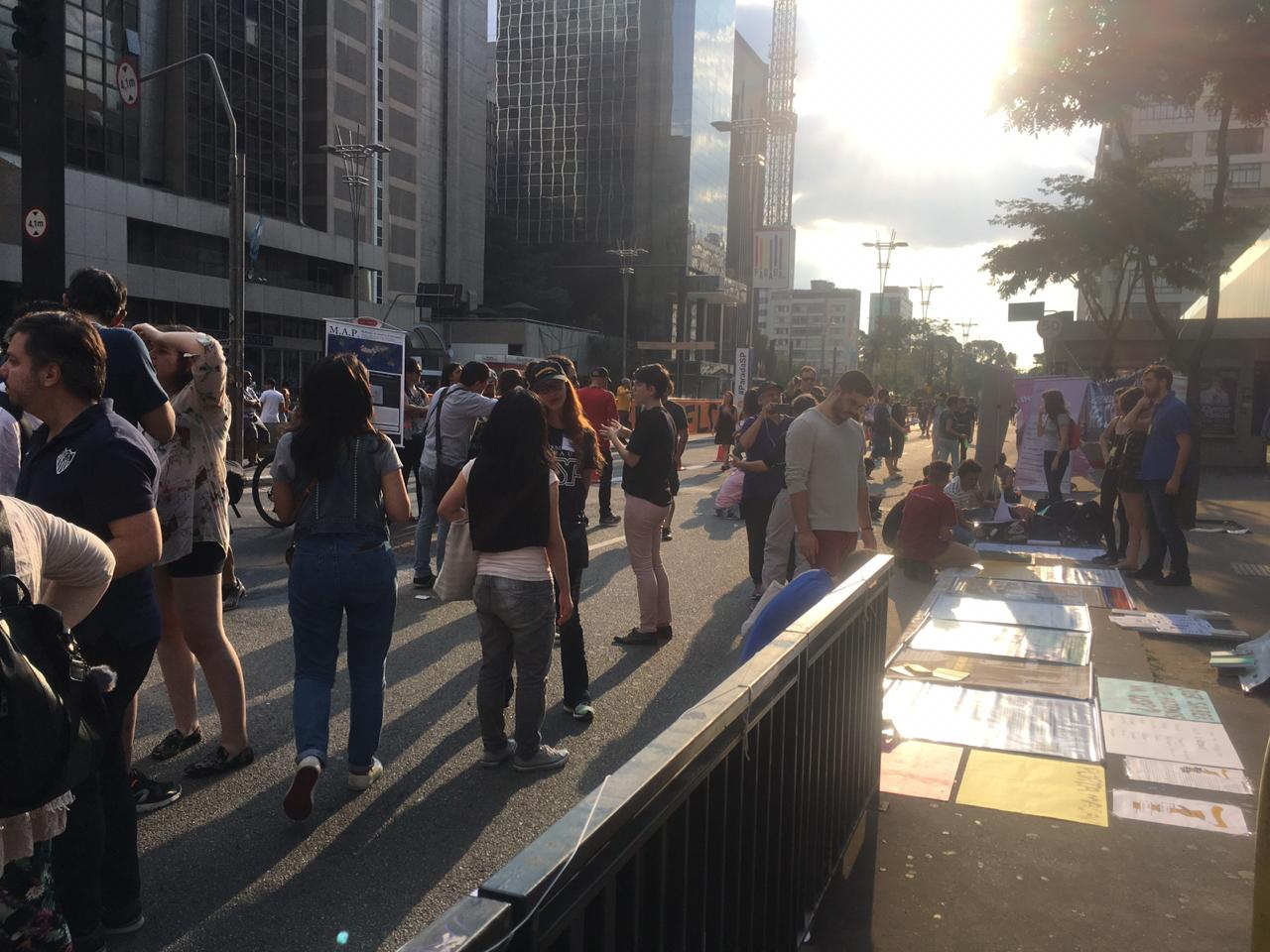 Evento de divulgação científica realizado pela FFLCH e os centros acadêmicos da Faculddade